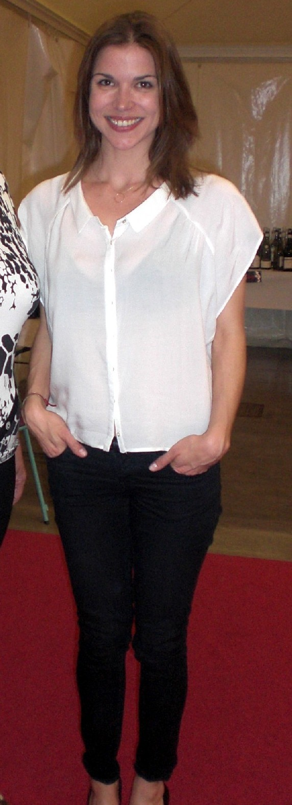 Elsa Kikoïne, présidente du concours des vins Féminalise 2011